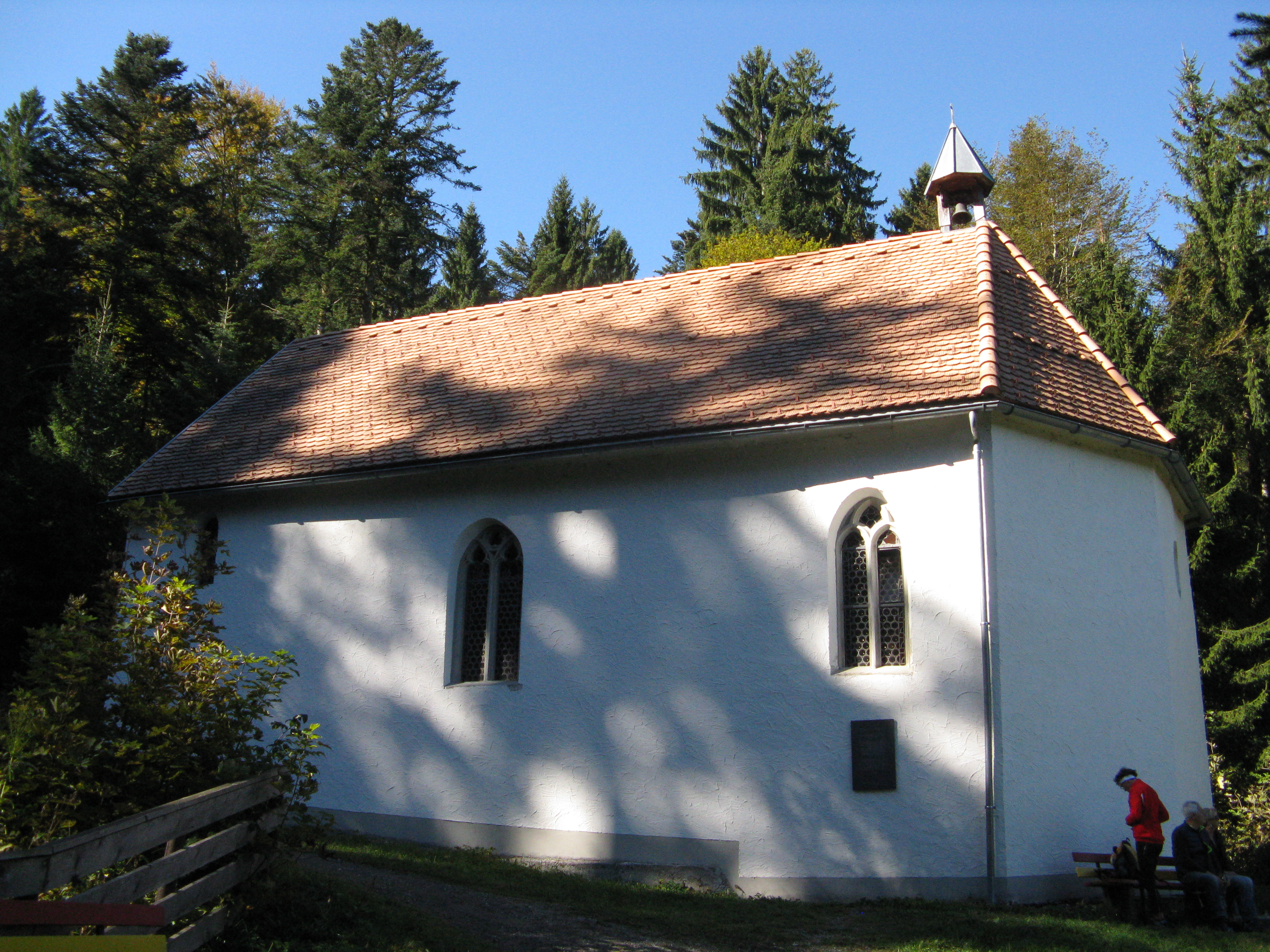 Kapelle hl. Ulrich